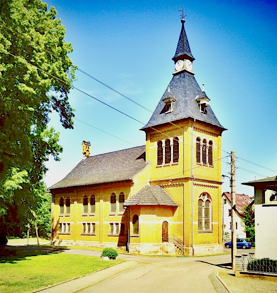 Taken with picplz at Bahnhof Niederschmalkalden in Schmalkalden, Germany .